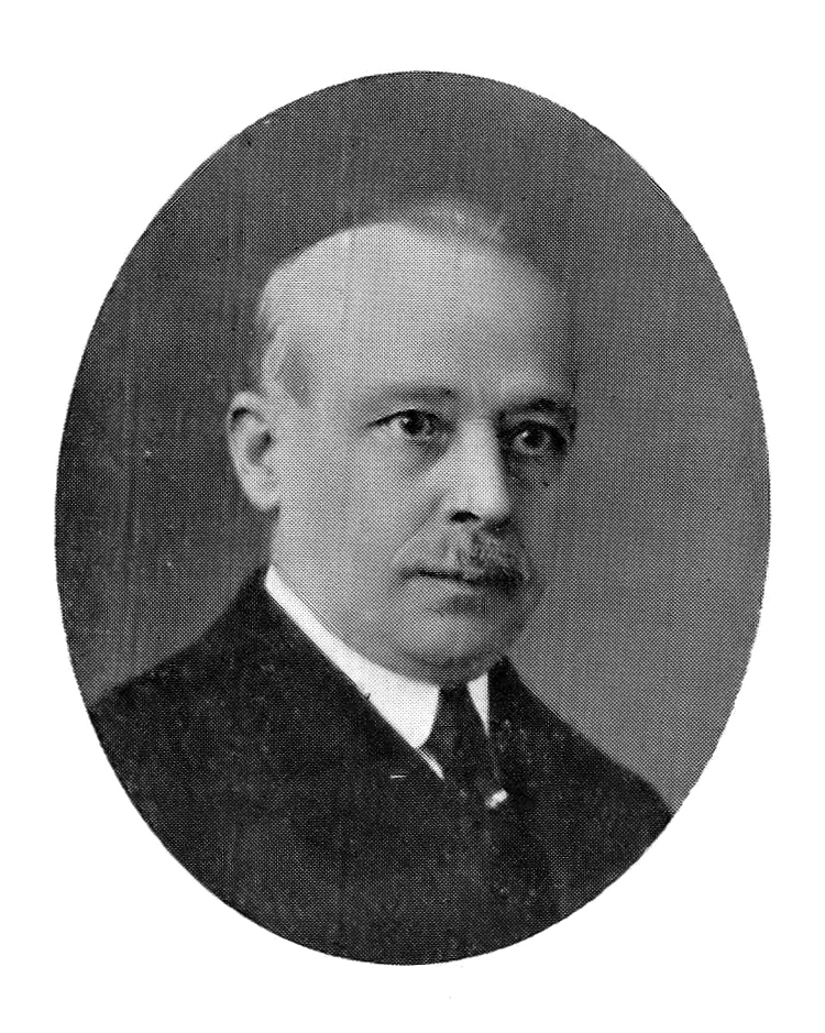 José María Manuel Cortina Pérez, Arquitecto, (1868 - 1950).